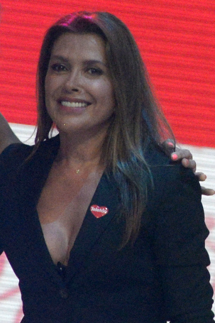 02 Diciembre 2016, Ministra Paula Narváez asiste a ceremonia de inauguración de Teleton 2016.